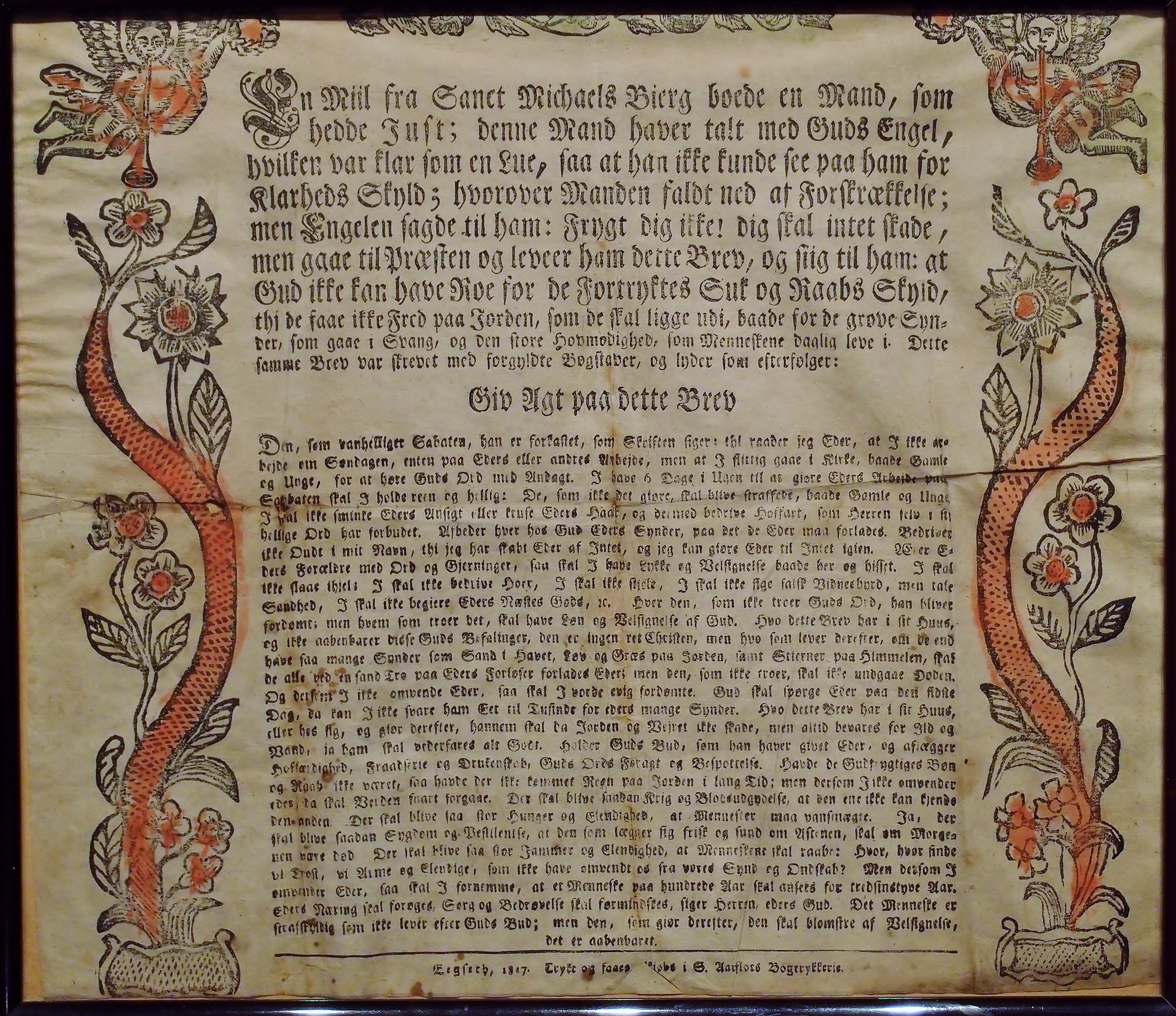 Himmelbrev frå Sunnmøre, trykt og forlagt av S. Aarflots Bogtrykkerie, Eegseth (i Volda) 1817